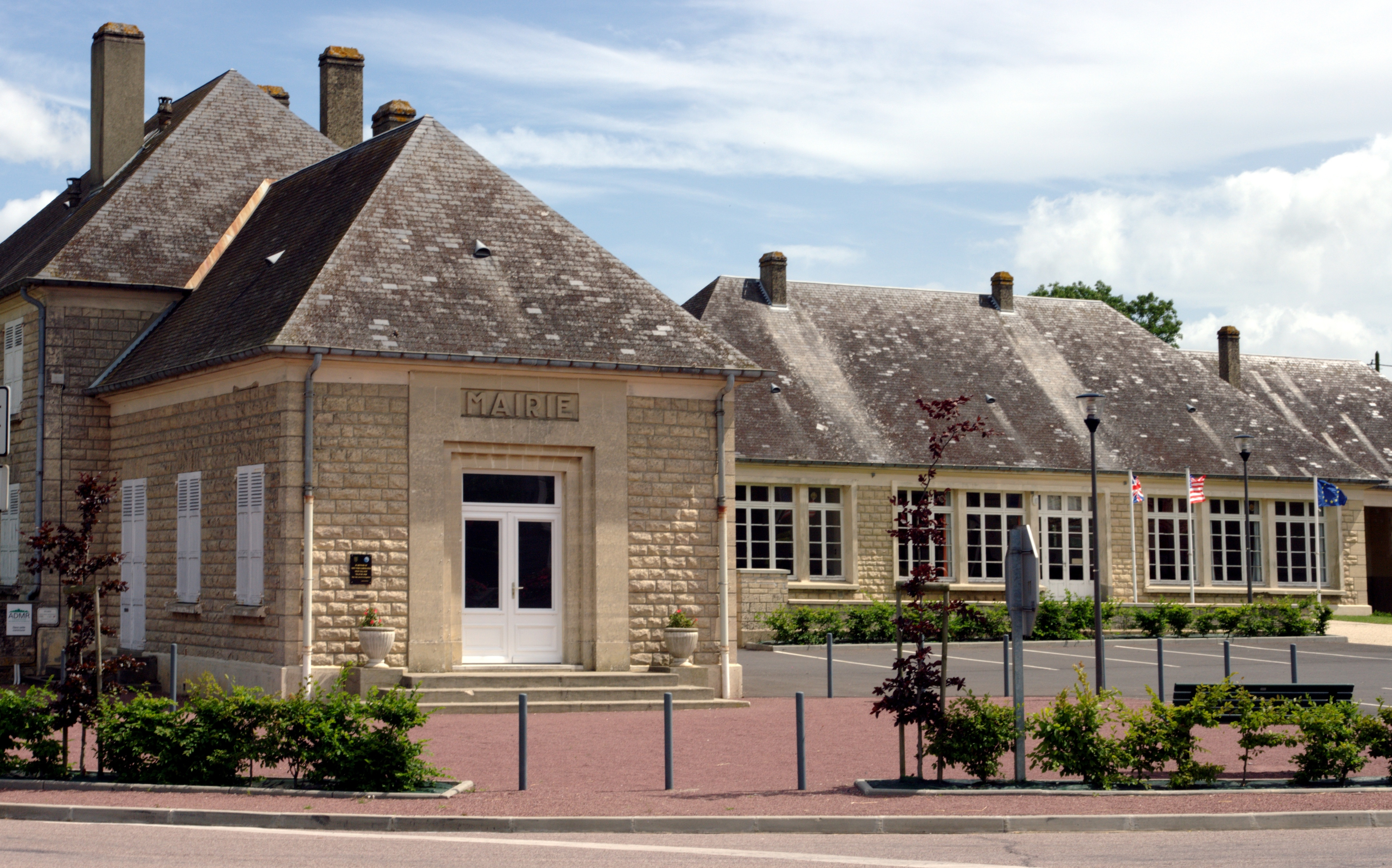 La Mairie de Formigny, Calvados.